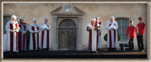 Intronisation des nouveaux membres lors d'un Chapitre.